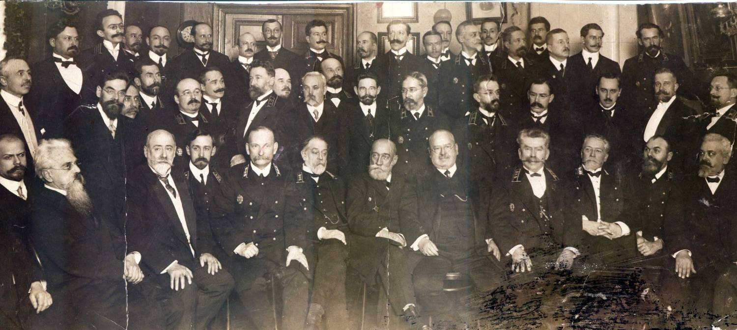 Совет съезда горнопромышленников юга России. 1911 год. (Горлов, Пётр Николаевич)